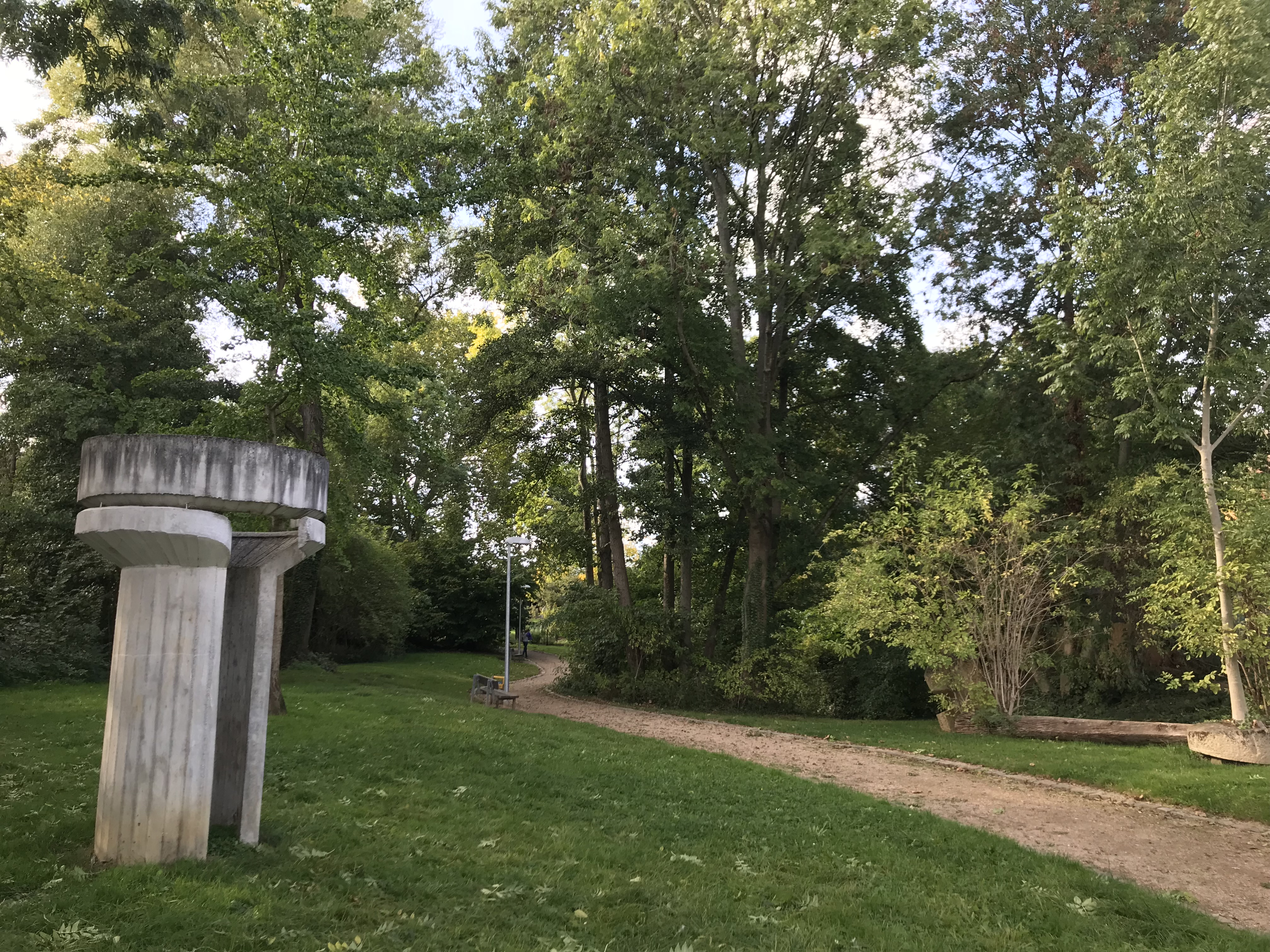 Skulptur im Broich-Park in Alfter